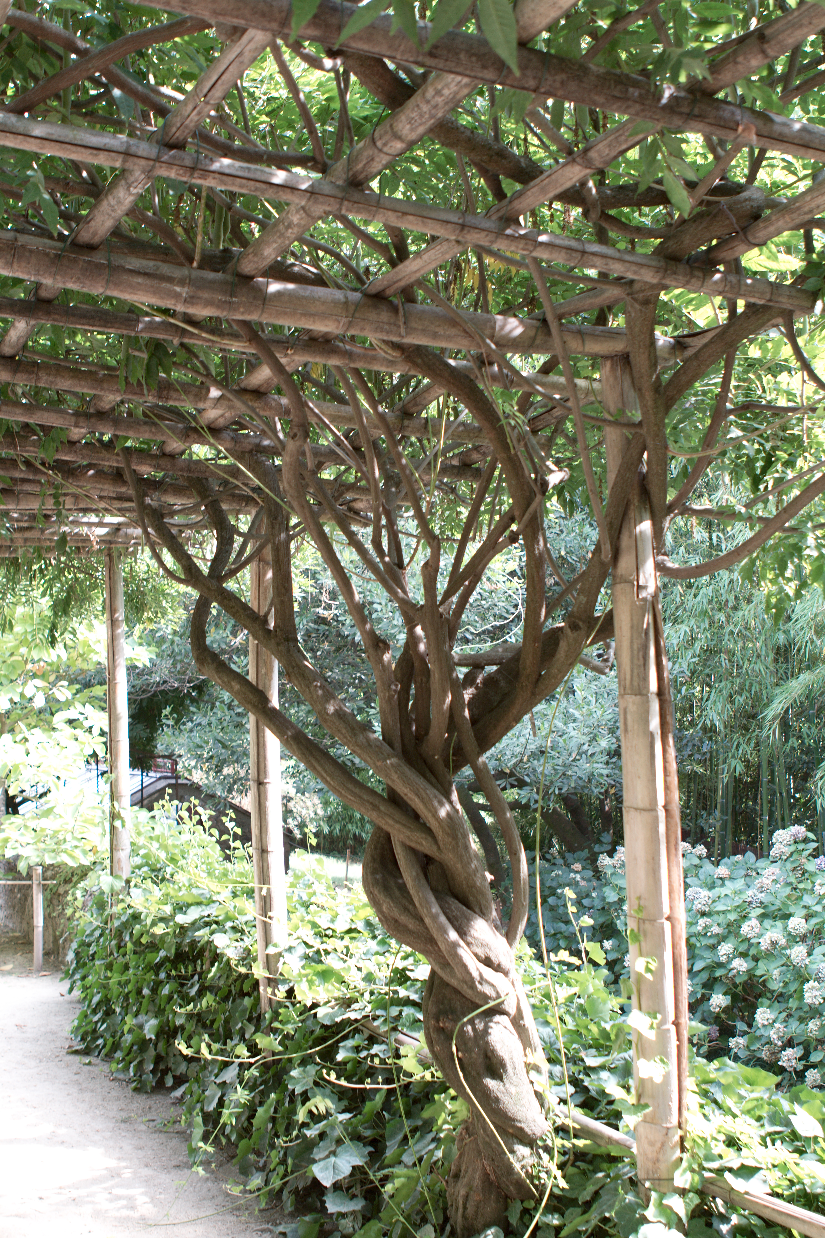 Trompette de Virginie (Campsis radicans Flava) à la bambouseraie de Prafrance (Gard, France).